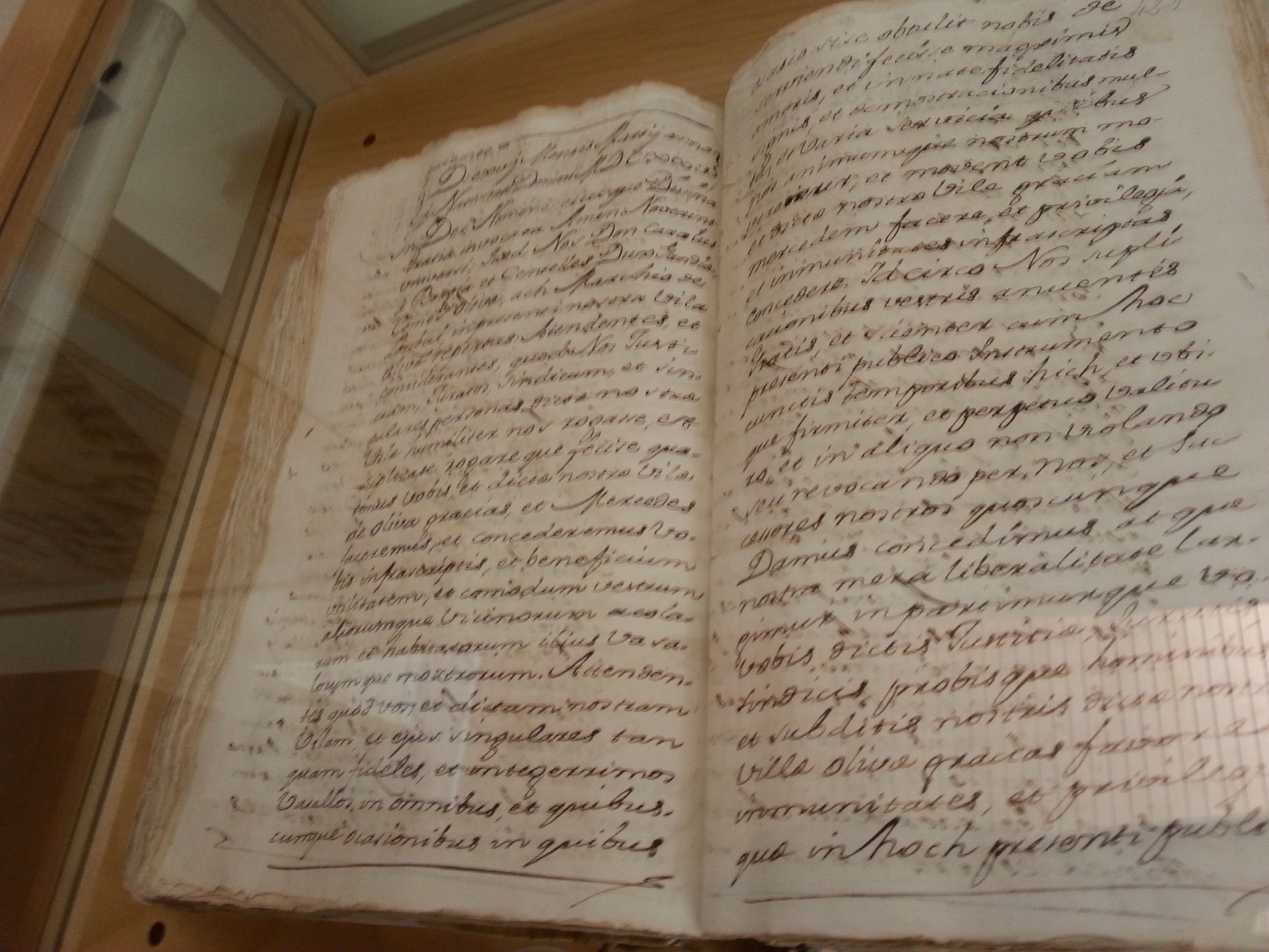 En Carles Borja i Centelles concedeix nova carta pobla a la vila d'Oliva davante el notari Damià Xiner (16 de març de 1625). ARV: Reial Justícia, llibre 807, fol. 421v, doble pàgina (còpia de 22 de setembre de 1767). Arxiu del Regne de València.